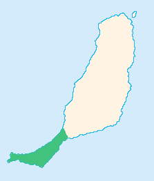 mapa de la peninsula de Jandía